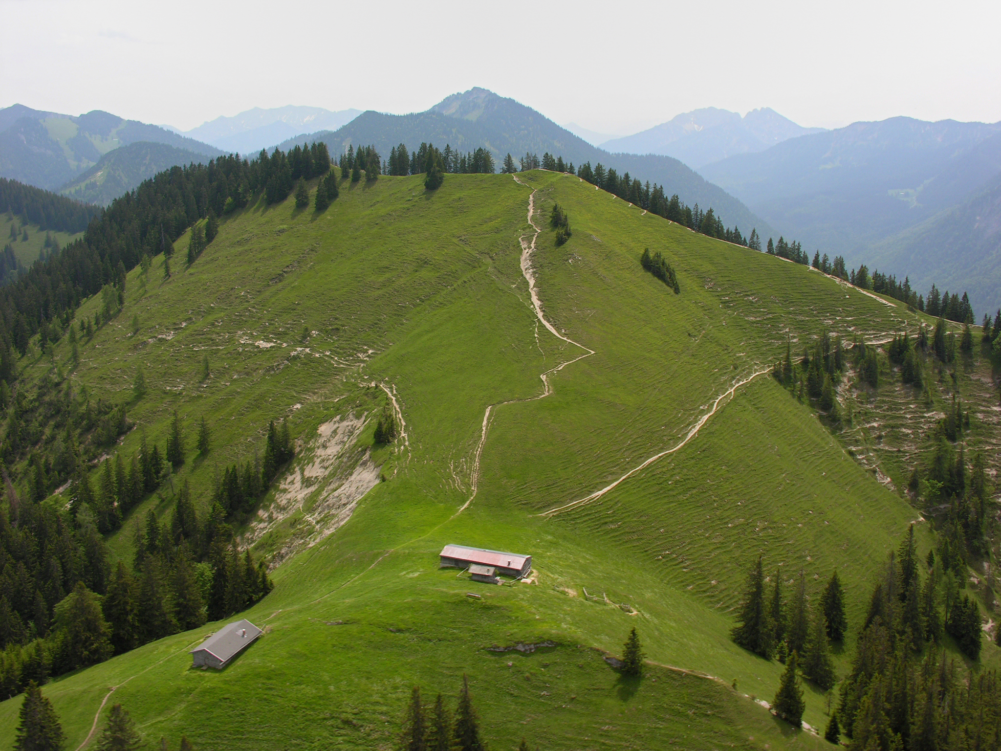 Germany, Bavaria, Baumgartenschneid